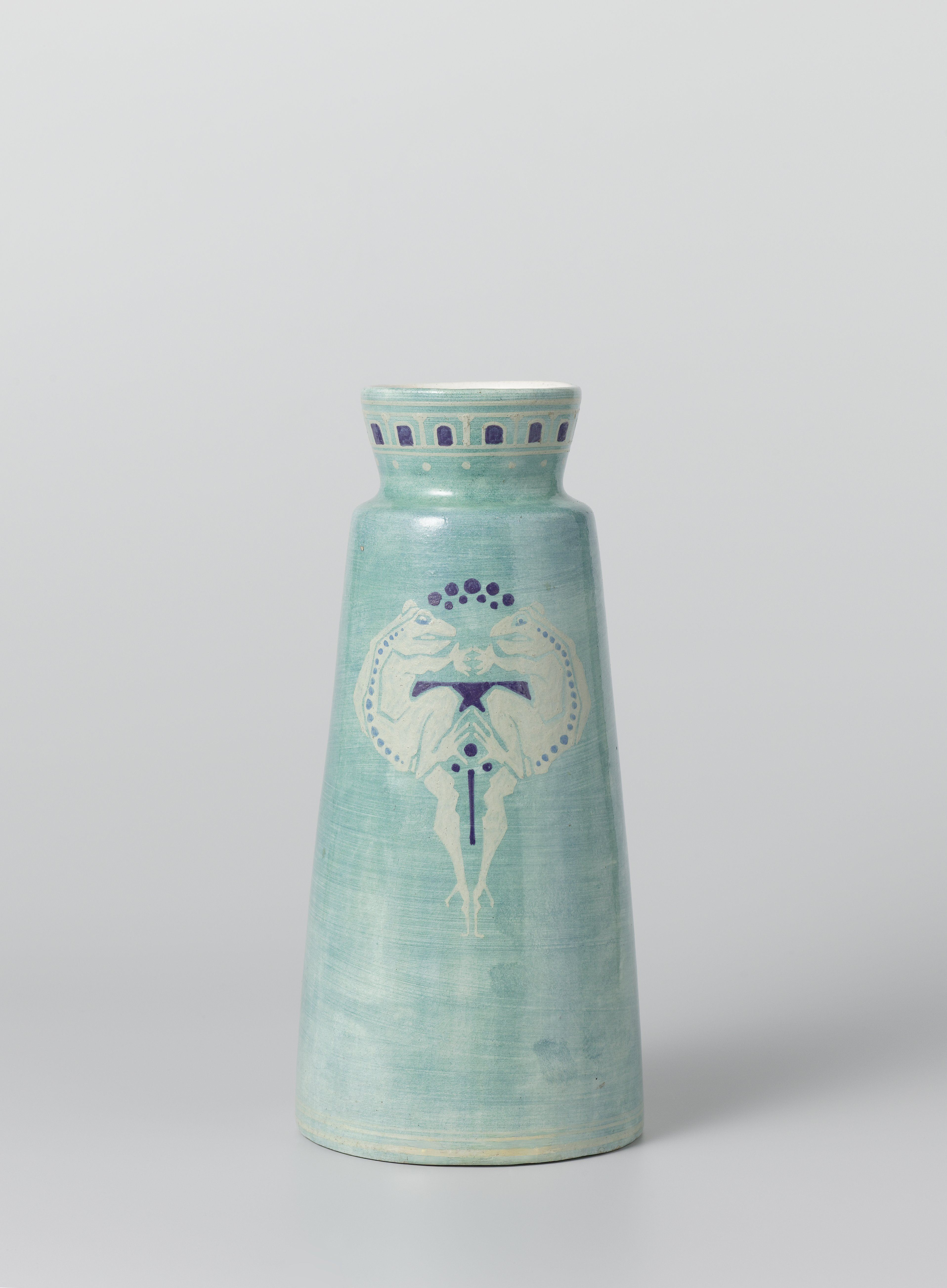 IdentificatieTitel(s): Vaas beschilderd met twee naar elkaar toegewende kameleonsObjecttype: vaas Objectnummer: BK-1975-96Opschriften / Merken: merk: ‘5. // D K P. // Dordrecht. // Holland. // J.v.d.V’ (in blauw)Omschrijving: Vaas van aardewerk, beschilderd met twee naar elkaar toegewende kikkers in wit, licht- en donkerblauw op blauwgroene fond, die de vaas geheel bedekt.VervaardigingVervaardiger: ontwerper: Johannes van der Vetvervaardiger: De Dordtsche KunstpotterijPlaats vervaardiging: DordrechtDatering: 1903 - 1908Materiaal: aardewerk Techniek: schildertechniekAfmetingen: h 22,3 cm. × d 10,6 cm. Verwerving en rechtenVerwerving: aankoop 1975Copyright: Publiek domein